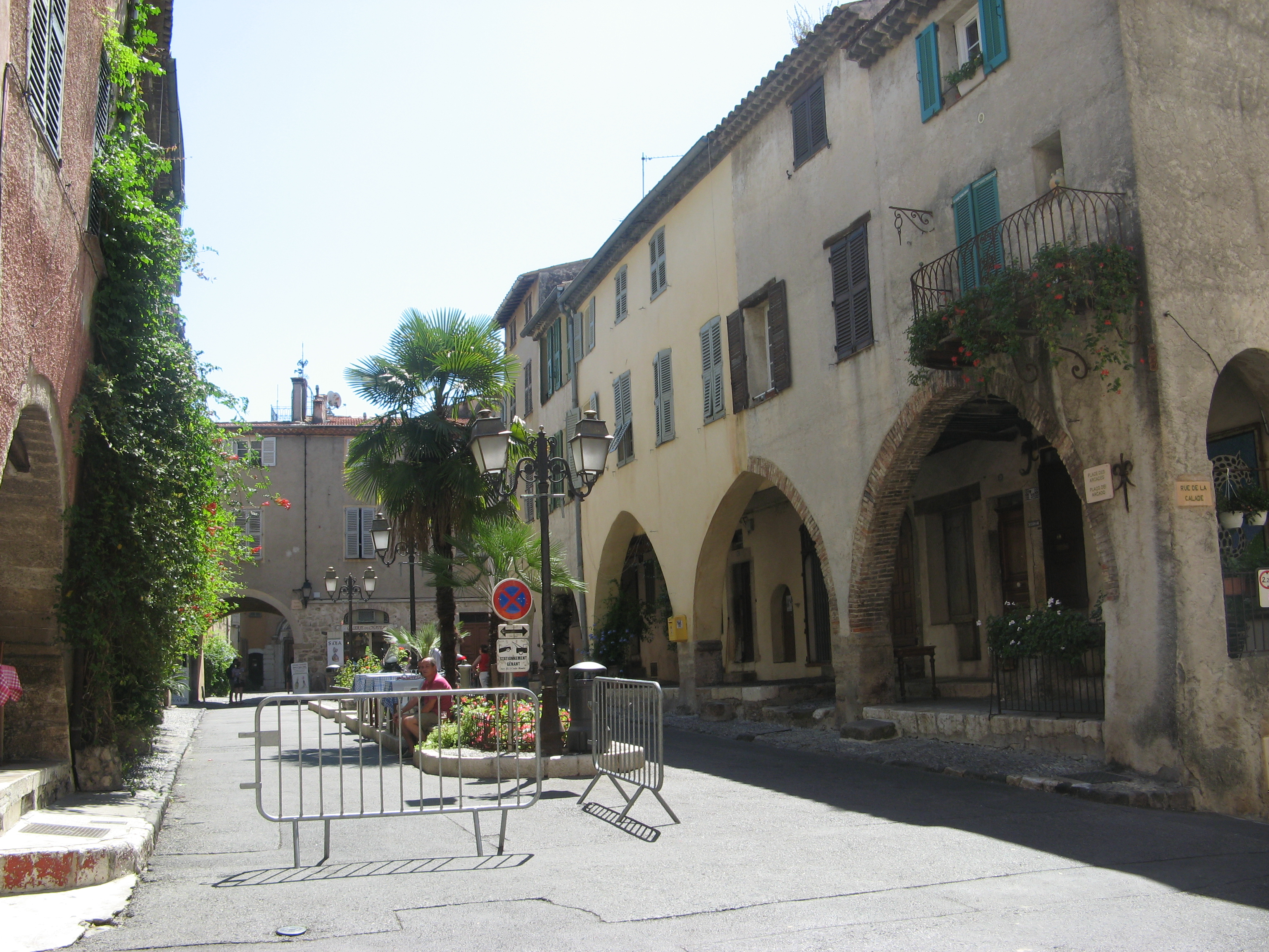 Plas des Arcase Biot